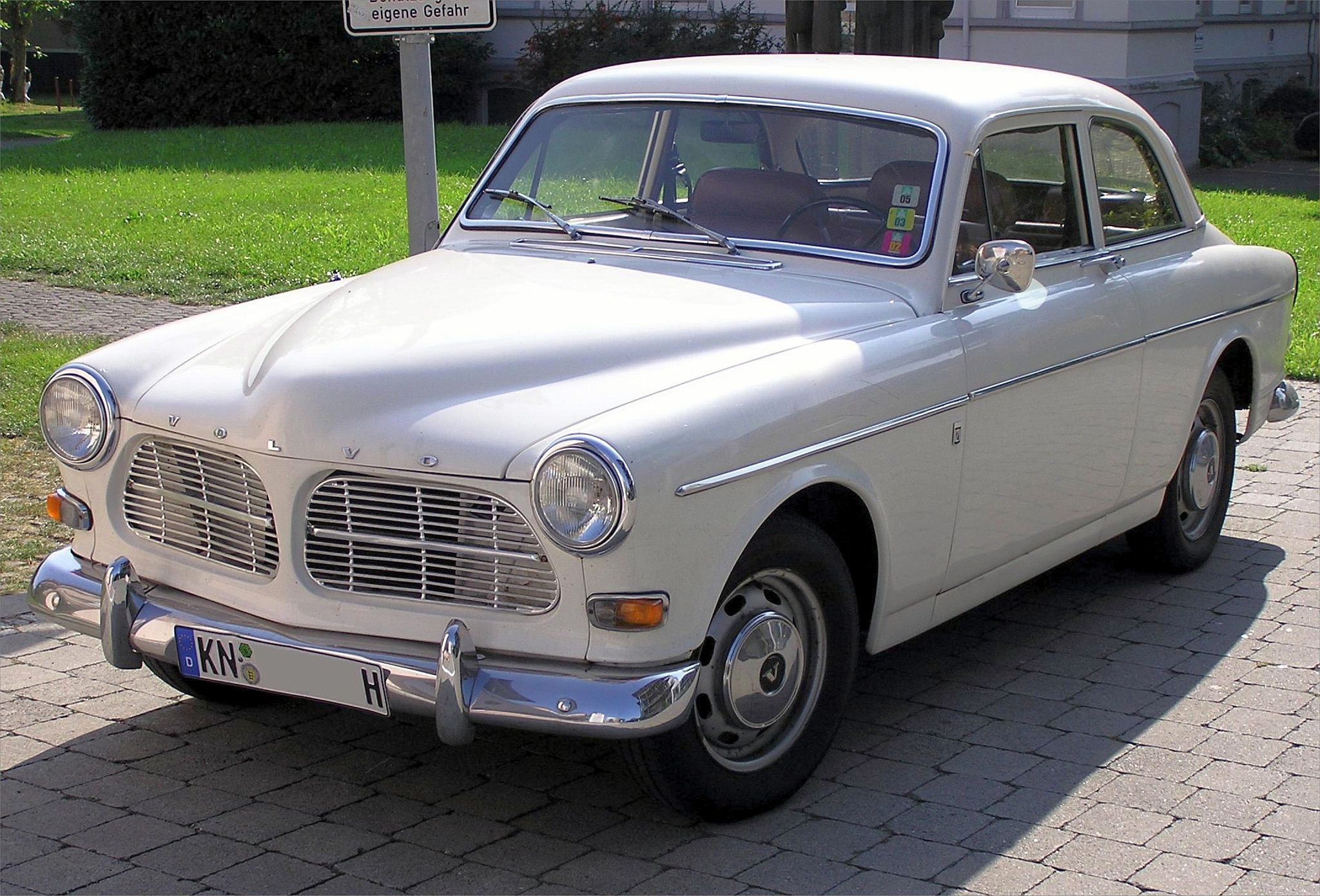 Objekt: Volvo 121 Weiß Autor/Quelle/Photograph: EinKonstanzer Datum: 02.09.2005, Konstanz